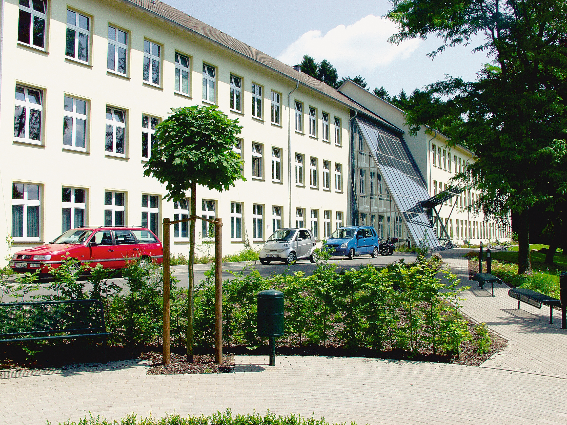 Haus 11, LWL-Klinik Warstein